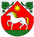 Česky: znak obce Lipina